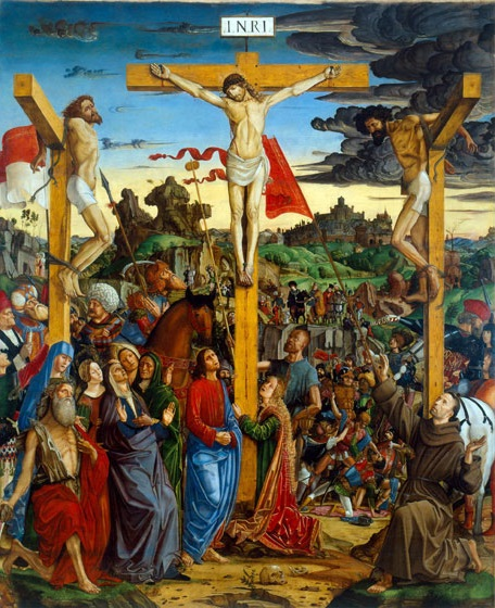 Pala delle Tre Croci (chiamata anche La Crocifissione di Mirandola), anticamente esposta presso la chiesa di San Francesco d'Assisi a Mirandola ed oggi all'interno della Galleria Estense del Palazzo dei Musei a Modena